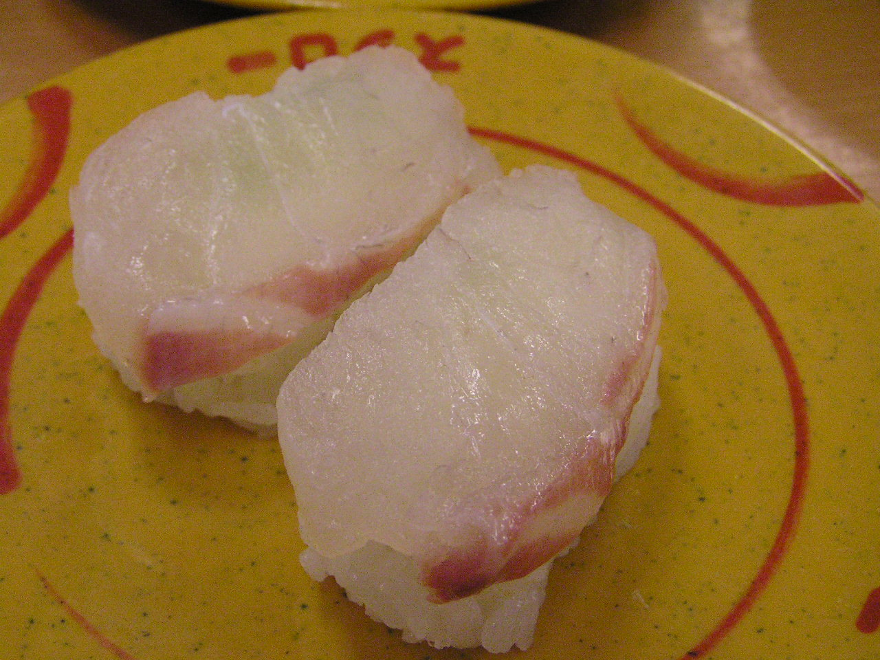 スシロー看板滝野店 スシローのタイ ～photo by Autumn Snake【おぉたむ すねィく探検隊】